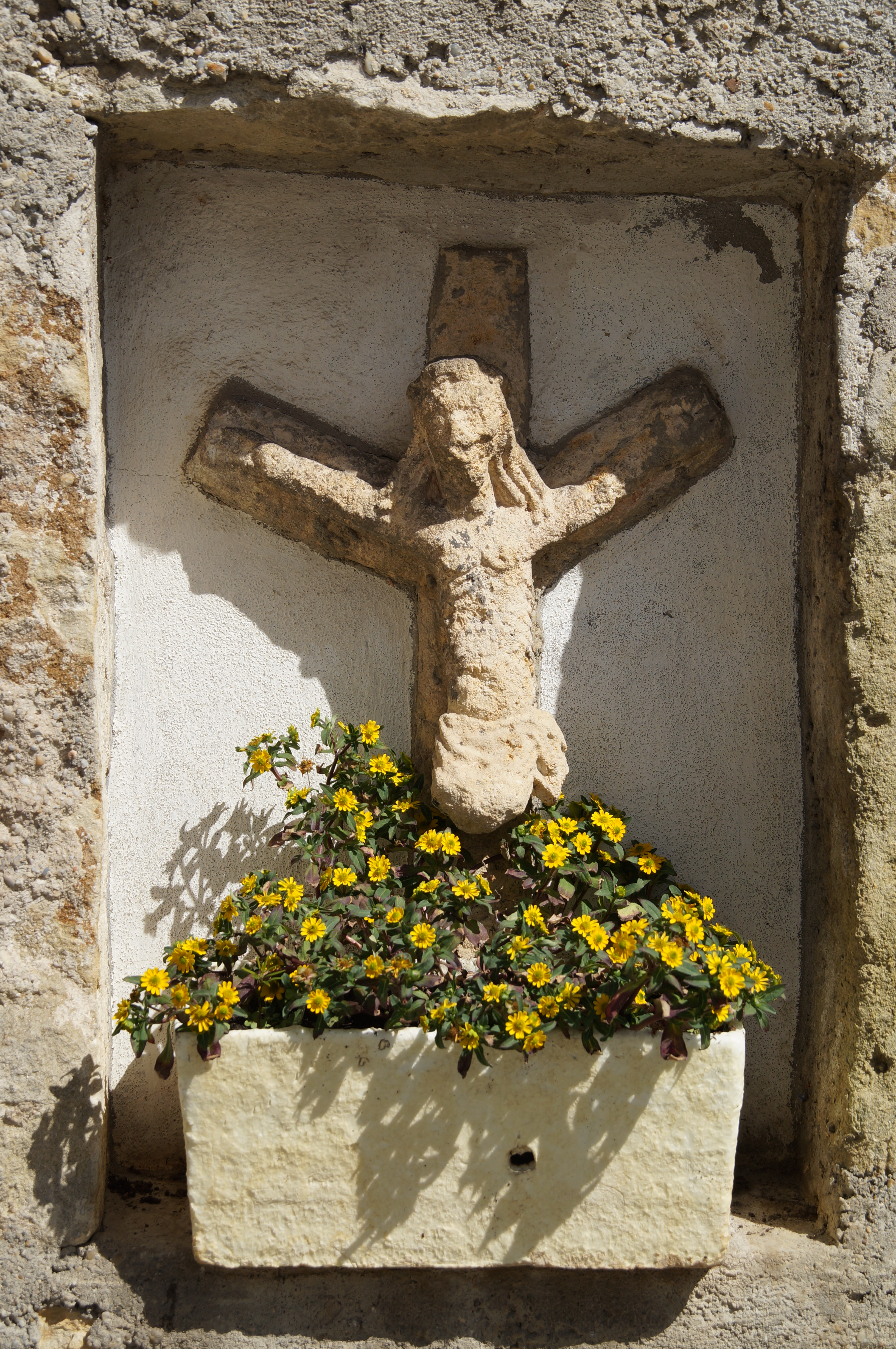 Katholische Pfarrkirche St. Nikolaus Friedhofsmauer mit Reliefs und Grabsteinen, 15.-17. Jahrhundert This is a photograph of an architectural monument.